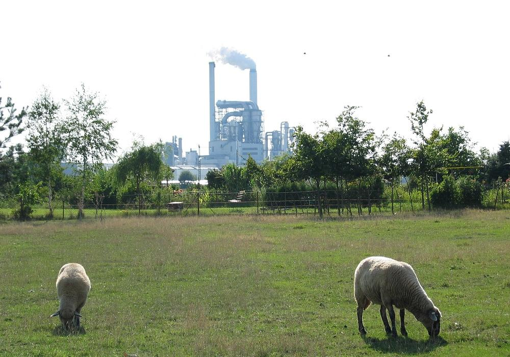 Kronospan Lampertswalde Dosiero:Kronospan Lampertswalde.jpg